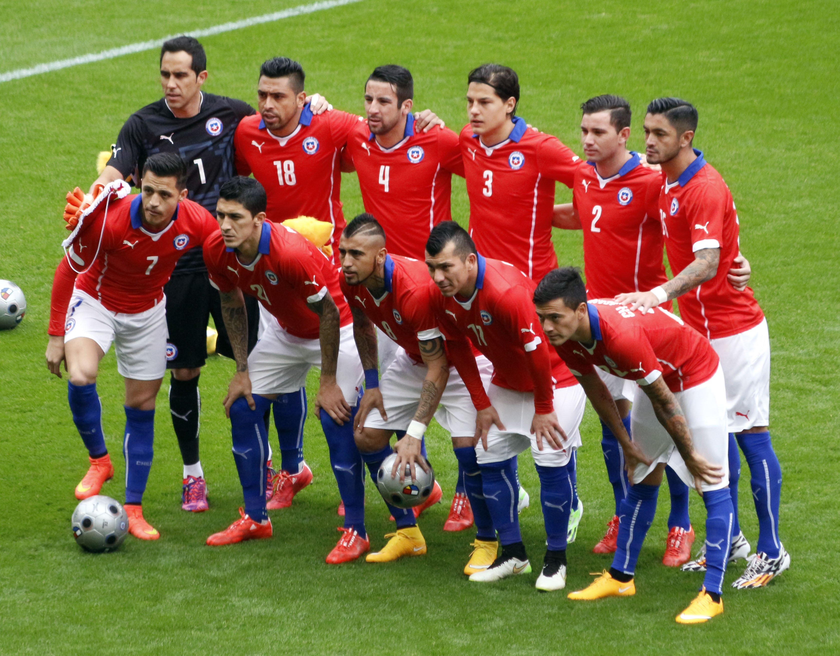 Alexis Sánchez Arturo Vidal Charles Aránguiz Claudio Bravo Eugenio Mena Gary Medel Gonzalo Jara Mauricio Isla Miiko Albornoz Pedro Hernández Rodrigo Millar Brazil vs Chile, International Friendly, 29th March, 2015, Emirates Stadium, London